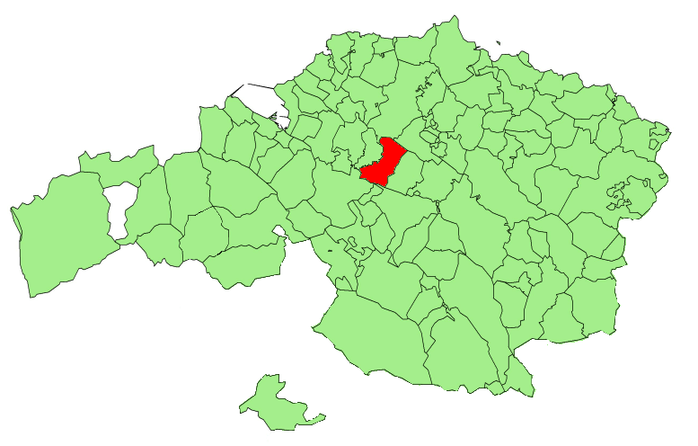 Zamudioko udalerriaren kokapena.